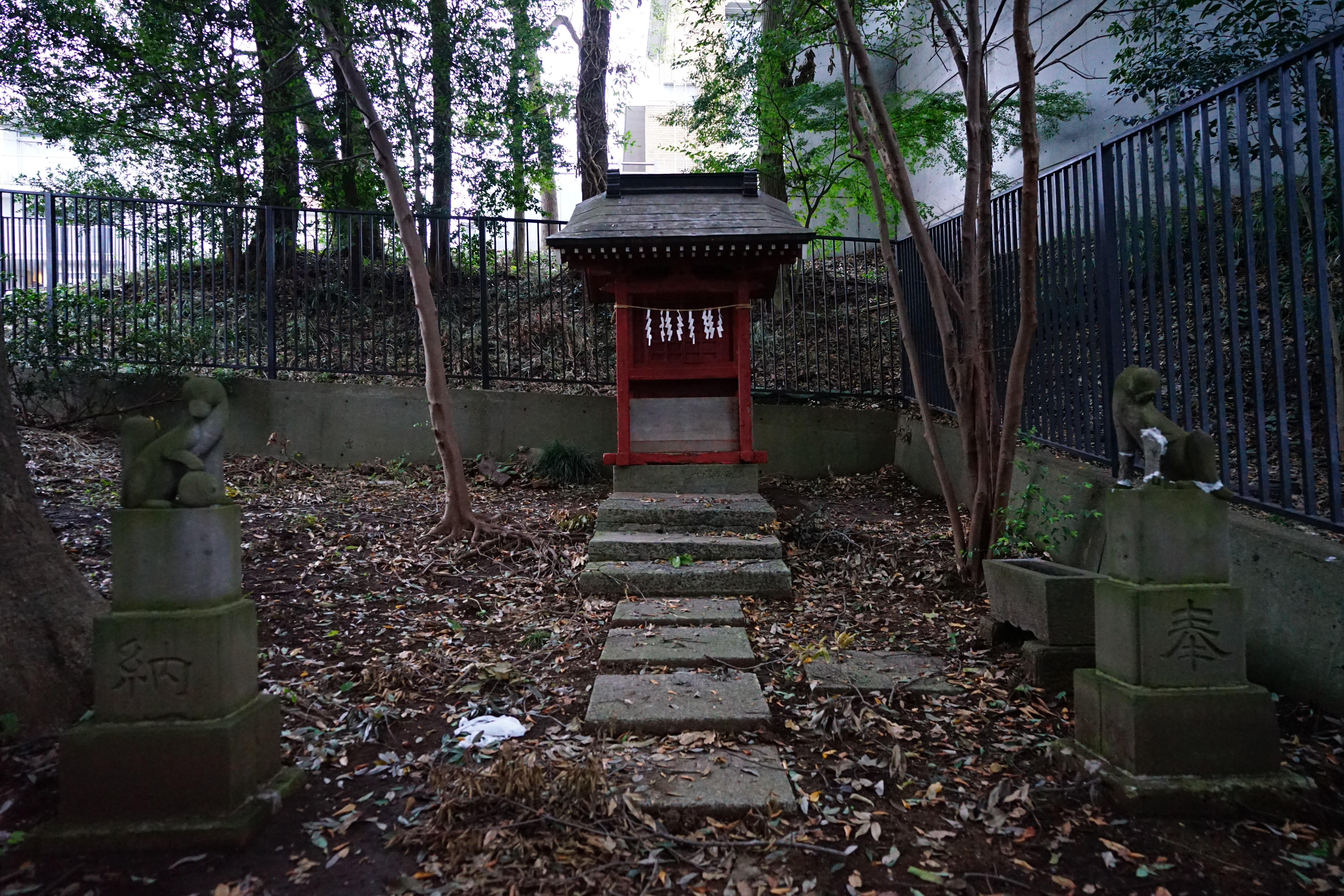 東京都調布市 里の森稲荷神社